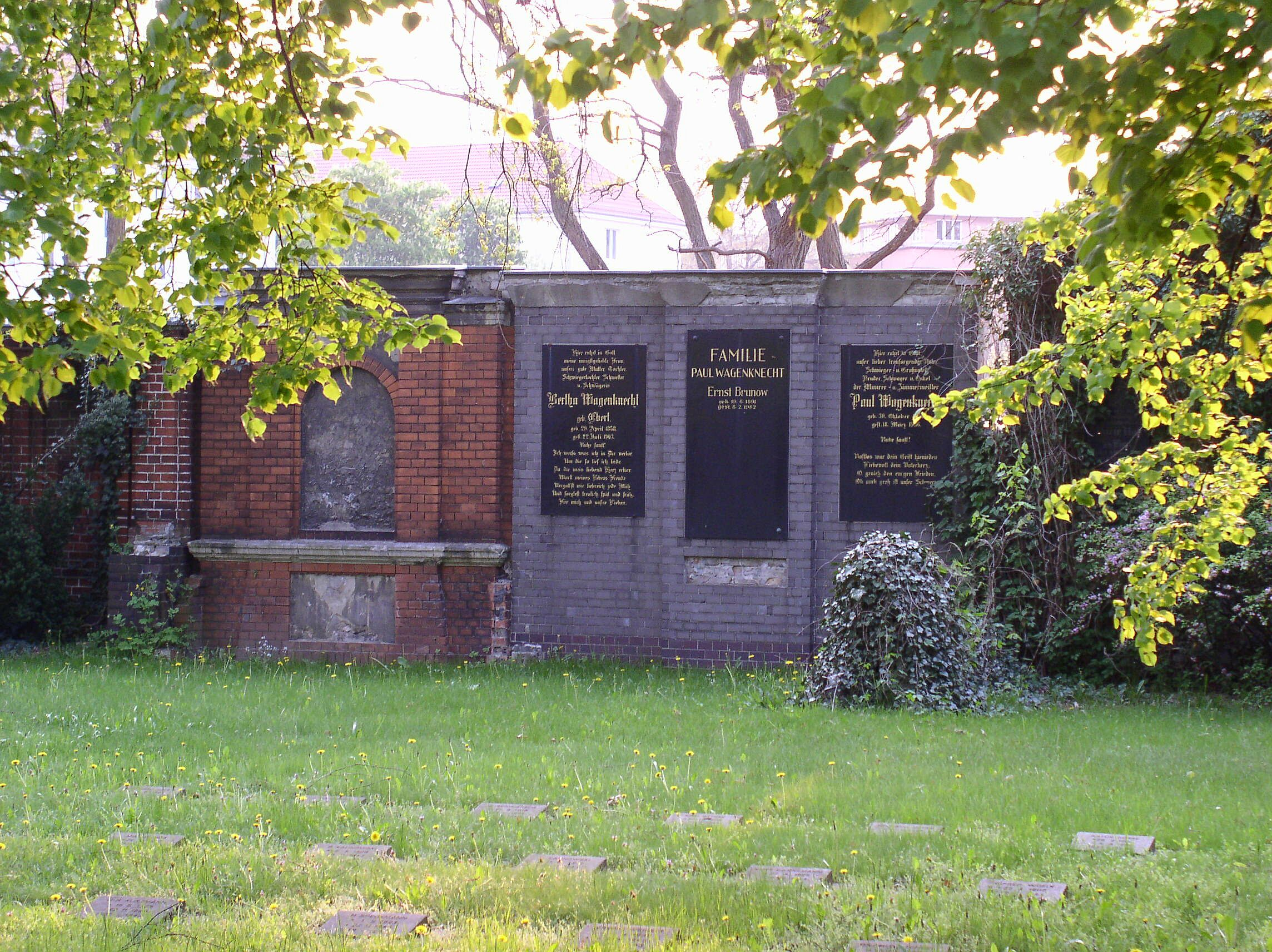 Graveyard Friedhof Rummelsburg at Berlin-Lichtenberg.